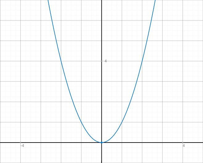 График квадратичной функции. (Парабола.)